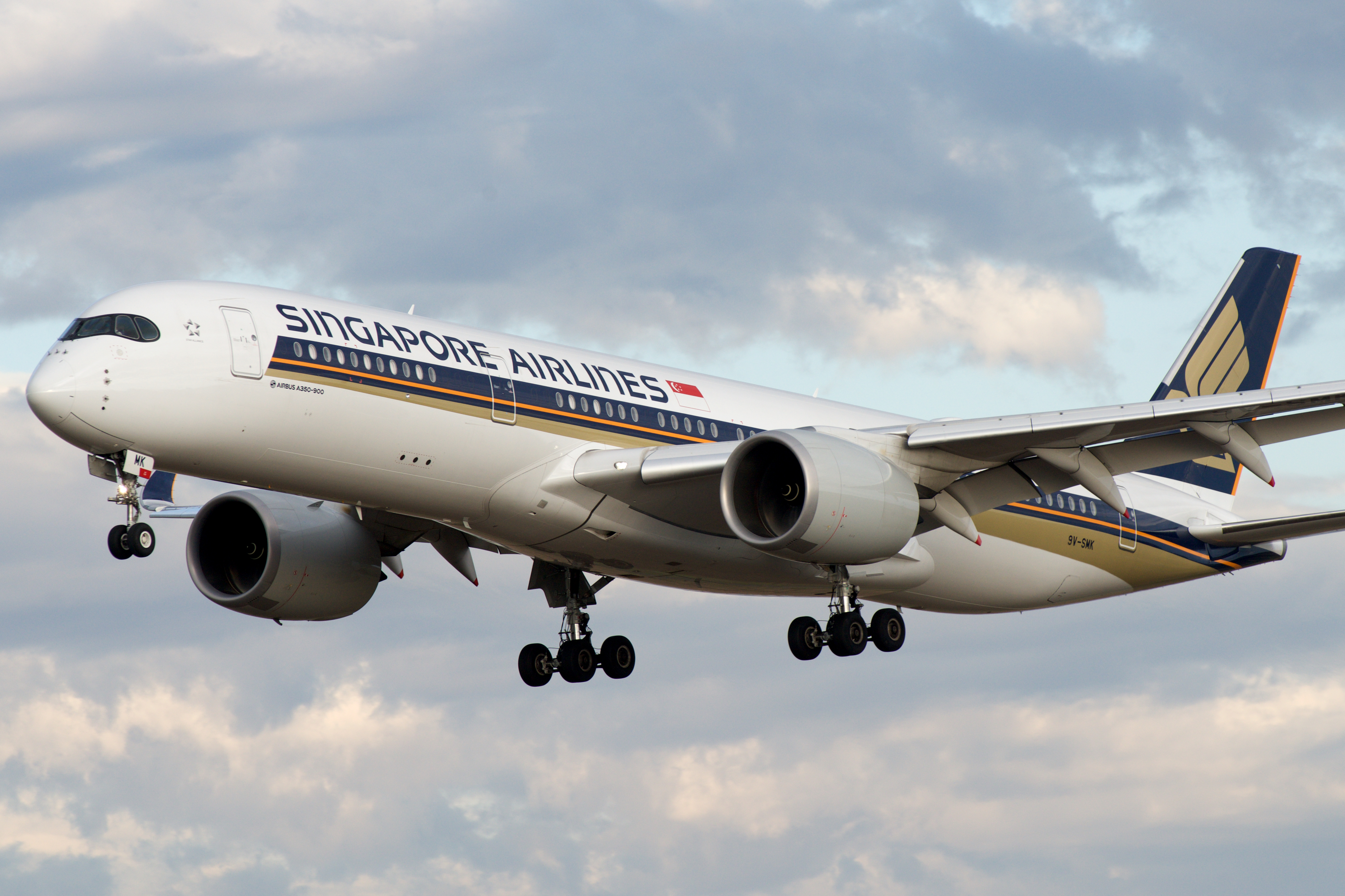 Evening arrival MEL